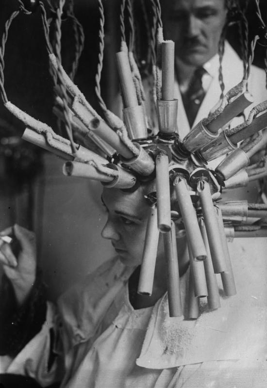 Was zur Herstellung erstklassiger Dauerwellen benötigt wird! Unser Bild zeigt eine Dame mit den Dauerwellenformen auf dem Kopfe, welche für die Schönheit des Bubikopfes garantieren und den Zweck haben, daß man im Laufe eines halben Jahres sein Haar nicht mehr zu ondulieren braucht.